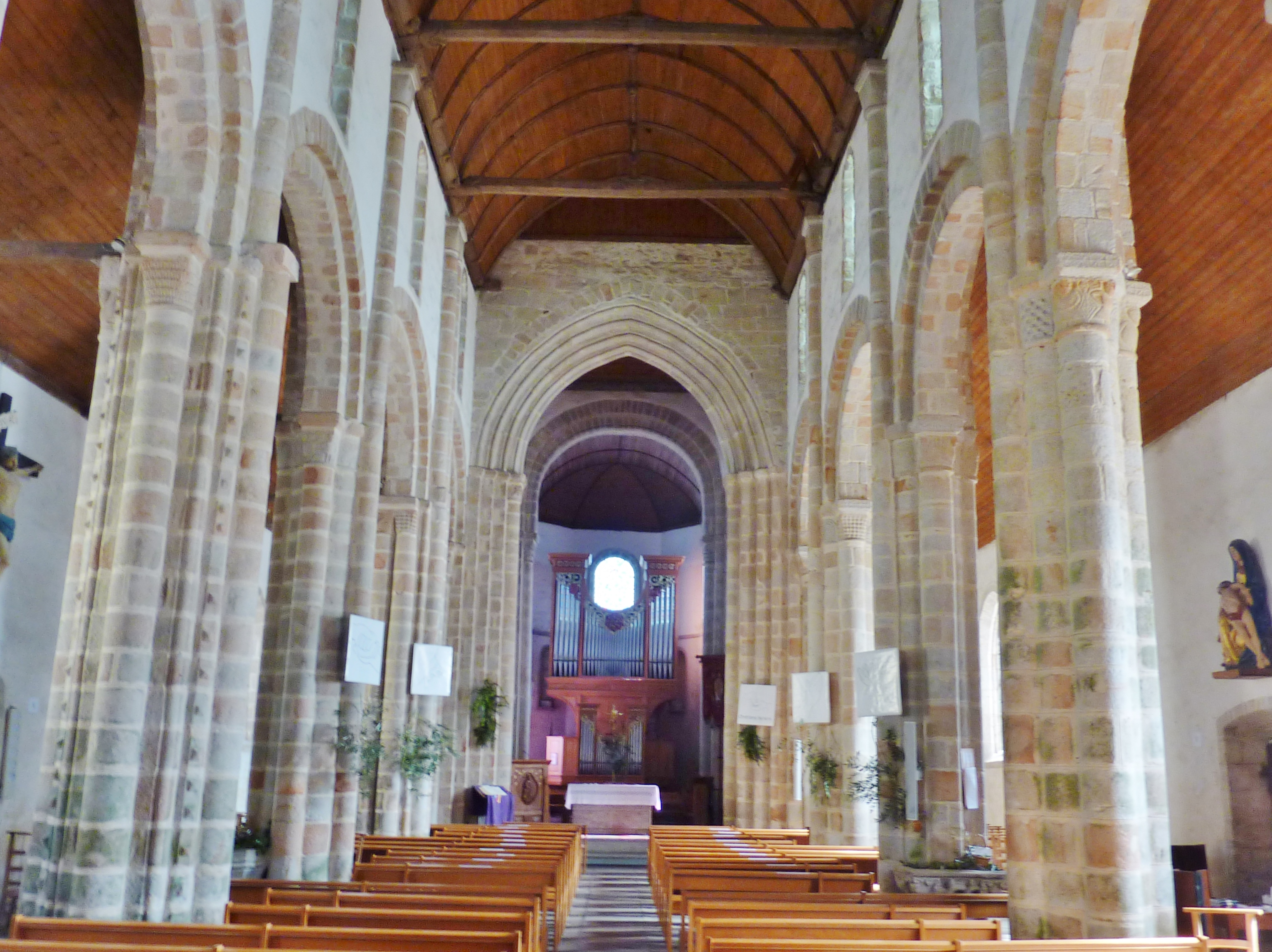 Fouesnant : église paroissiale Saint-Pierre-et-Saint-Paul, vue intérieure d'ensemble